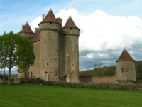 Château Médiéval de Sarzay prise par grostophe en avril 2005. Chateau fort de la fin du Moyen Âge, situé sur la commune de Sarzay, en Indre, dans la région Centre.